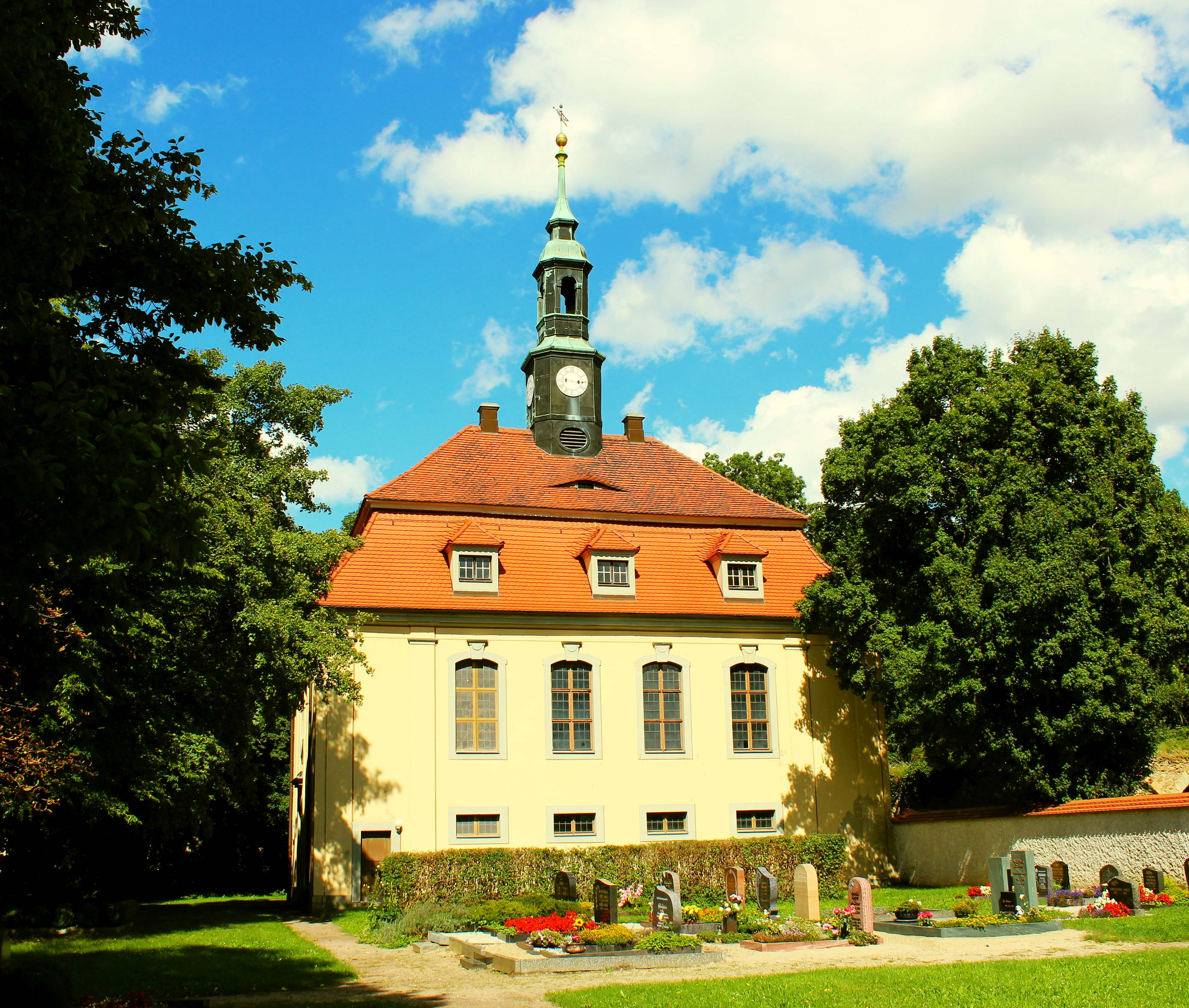 Schlosskirche Tiefenau